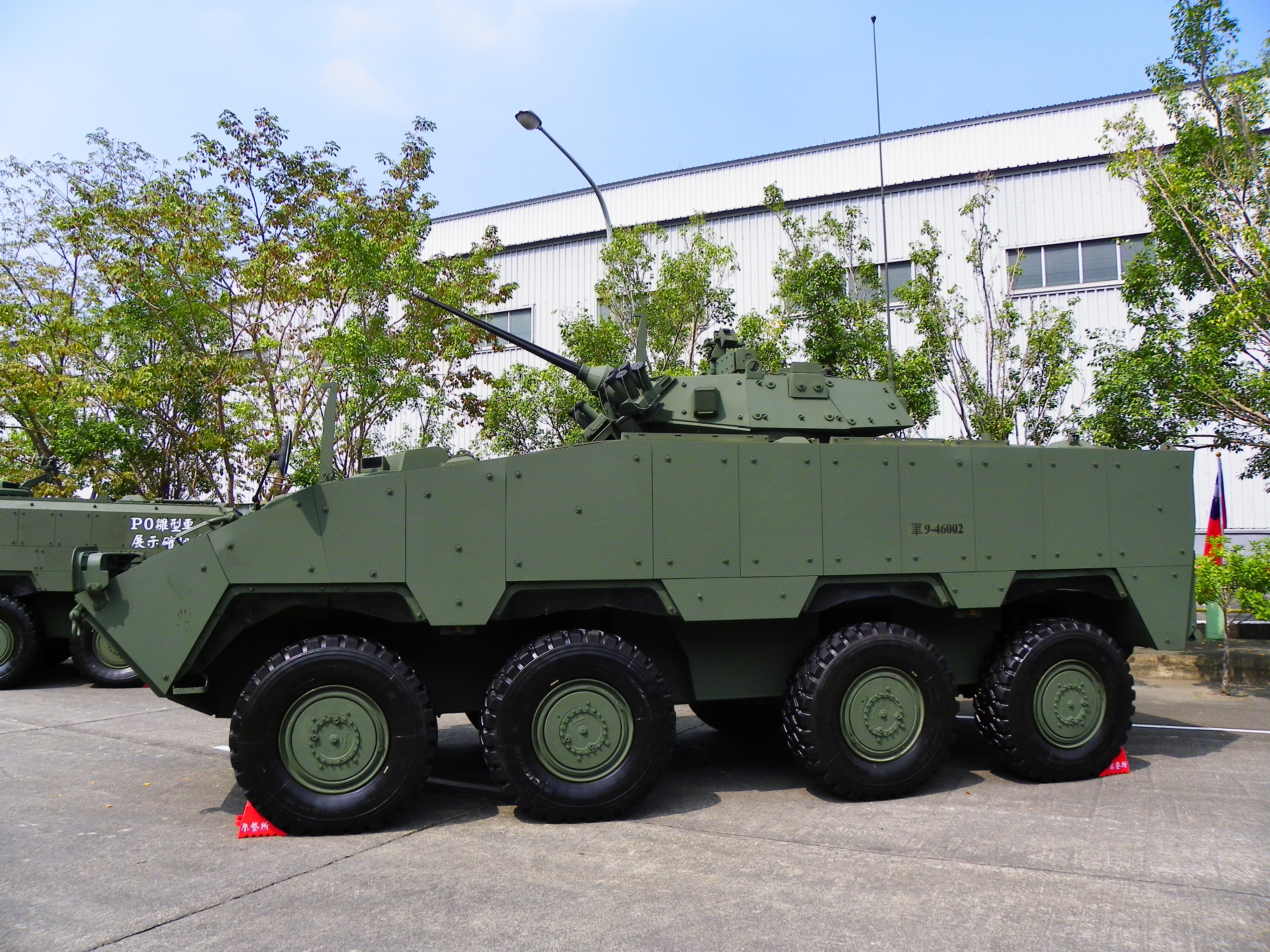 搭載25公釐鏈砲砲塔的雲豹P2樣車左側，攝於2012年兵整中心營區開放活動。